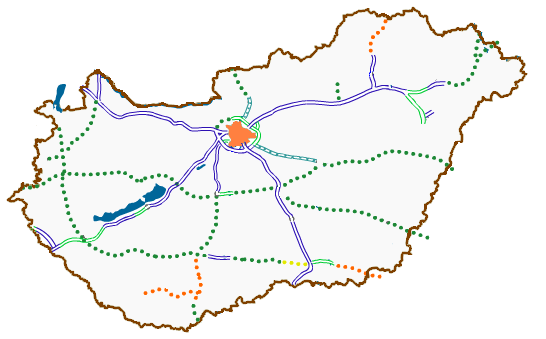 Projet d'ouvertures et prolongations d'autoroutes hongroises.